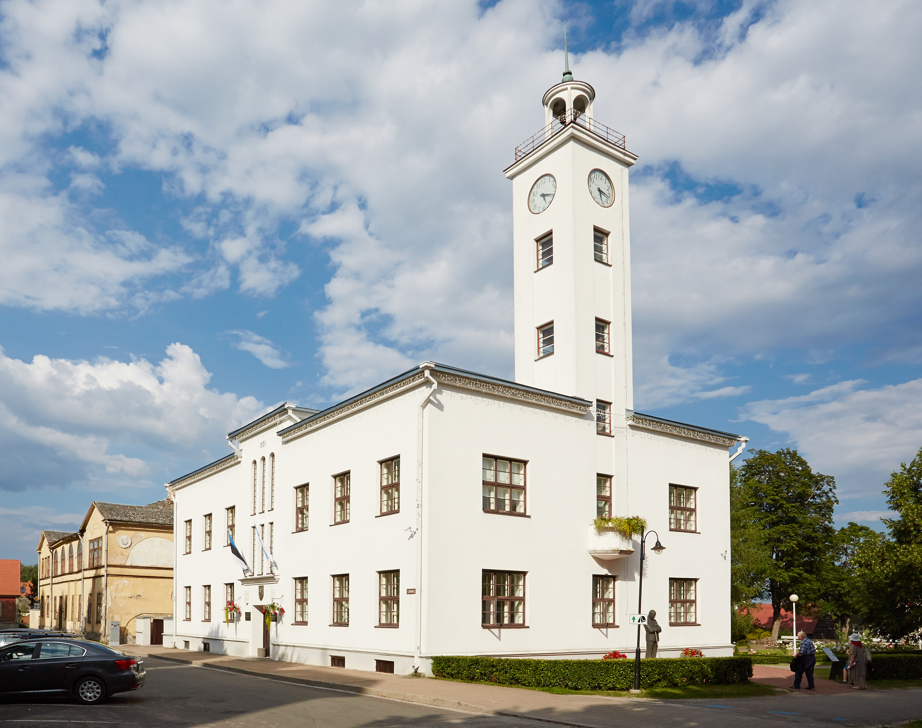 Viljandi linnavalitsuse hoone